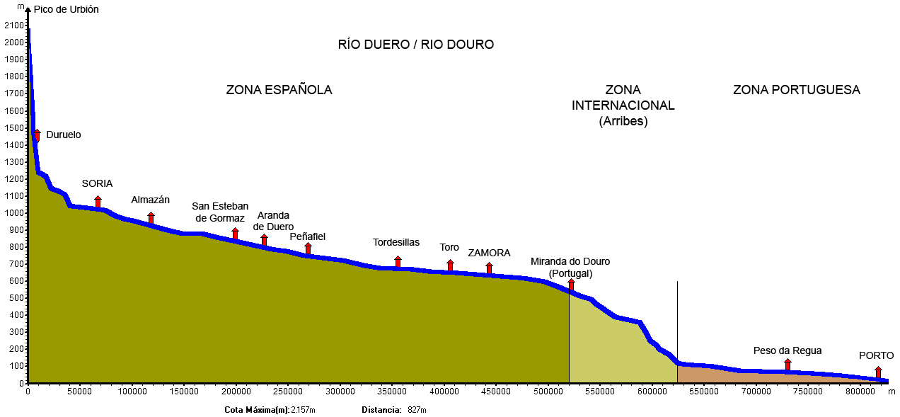 Perfil del río Duero/Douro. Nótese que este perfil es inusual pues muestra una convexidad en la zona central que es poco común en ríos de regiones atectónicas (la cuenca de Duero no ha sufrido apenas deformación tectónica en los últimos 15 millones de años).